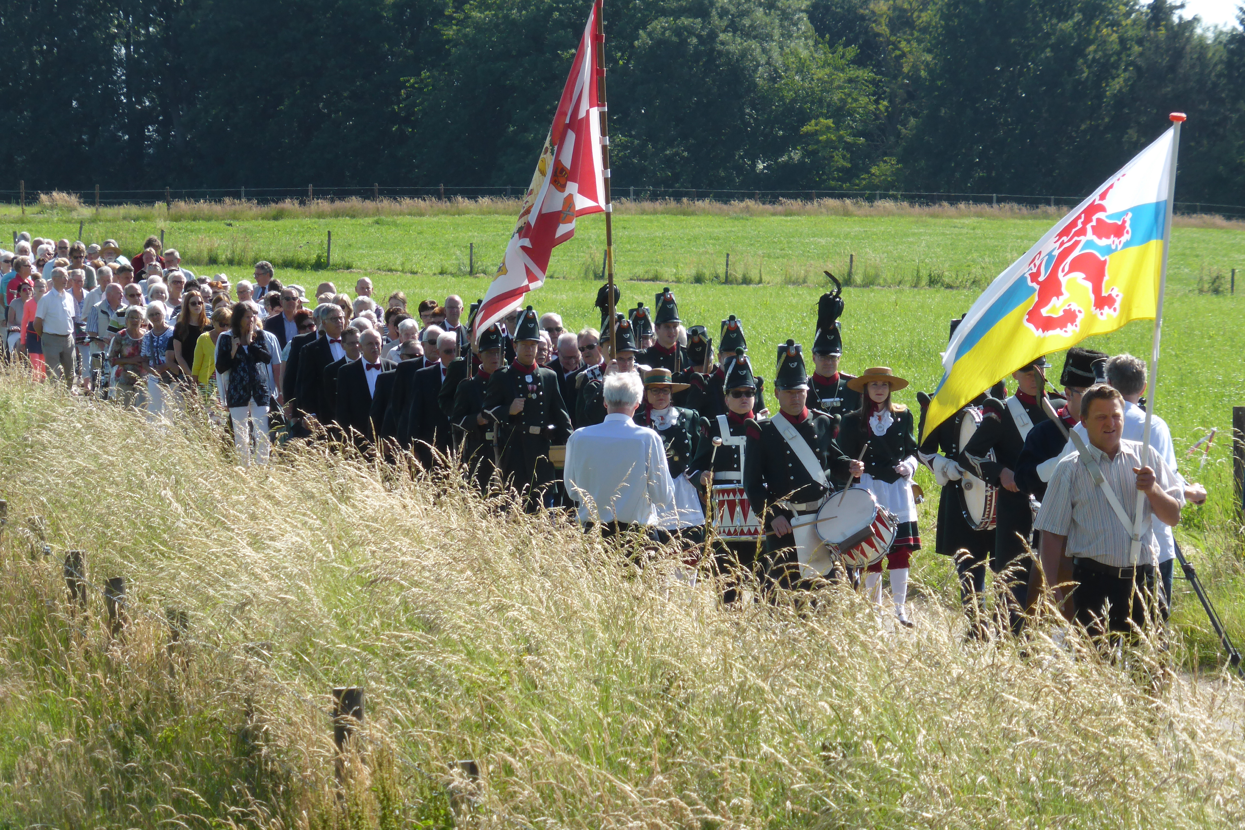 Sjaasbergergank: pelgrimstocht